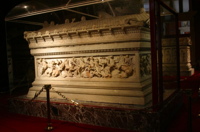 Alexandersarkofagen fra 4.århundre f.kr. marmor, Arkeologisk Museum, Istanbul